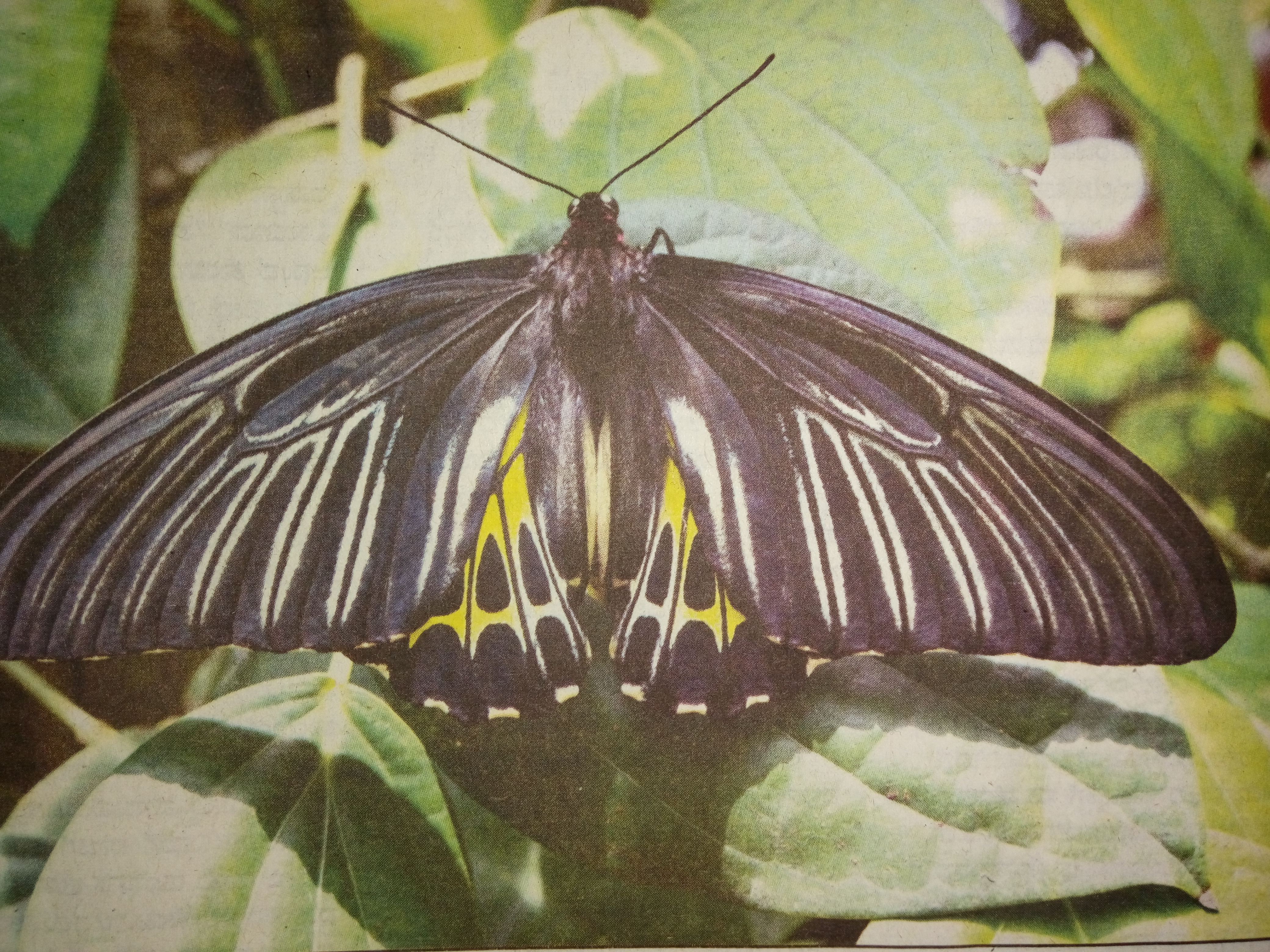 ಕನ್ನಡ: ಸದರ್ನ್ ಬರ್ಡ್ ವಿಂಗ್ ಚಿತ್ರ